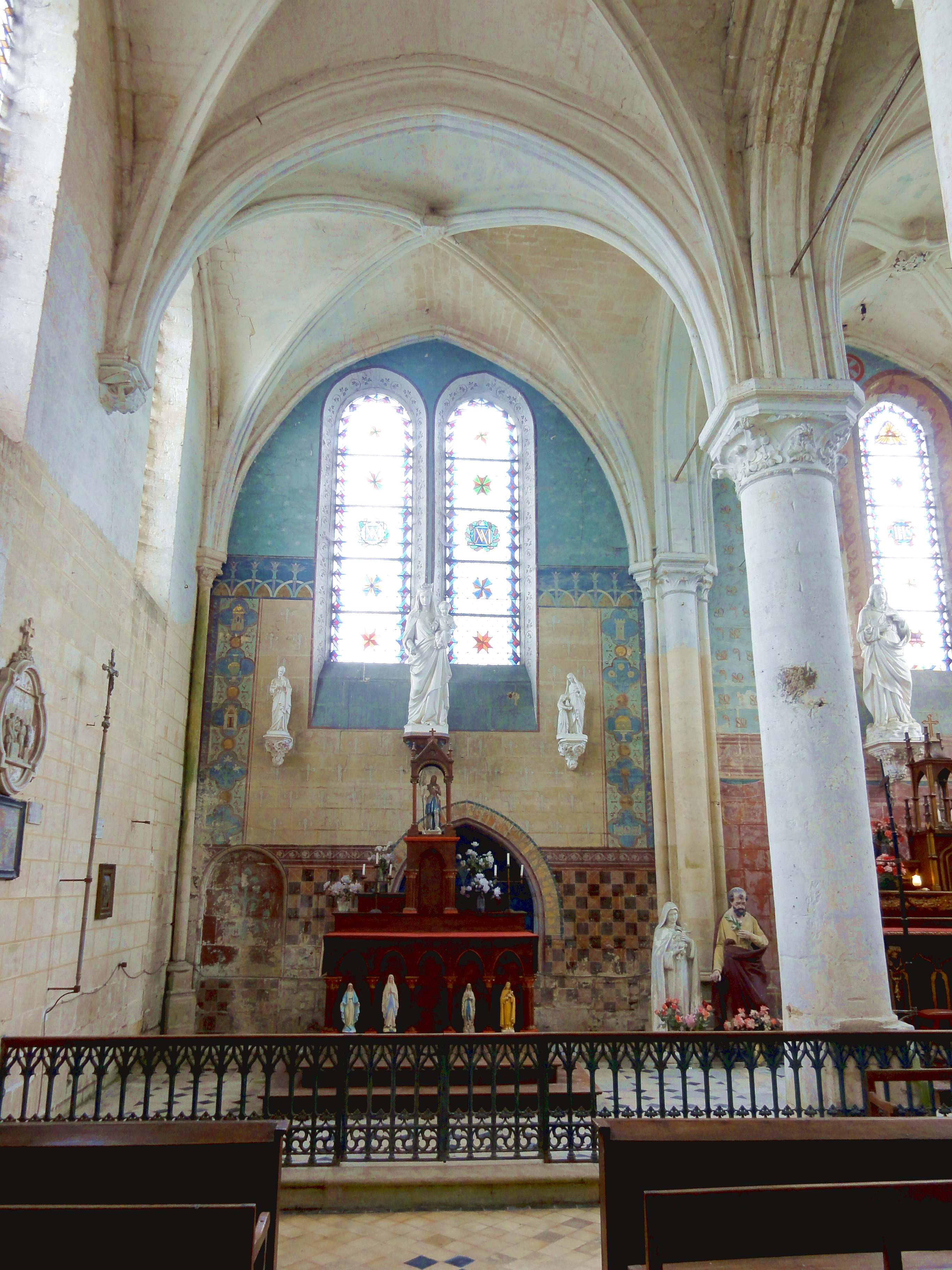 Intérieur de l'église - voir titre.